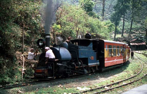 Eisenbahn nach Darjeeling (toy train) (eigene Aufnahme 1998, GNU-FDL)